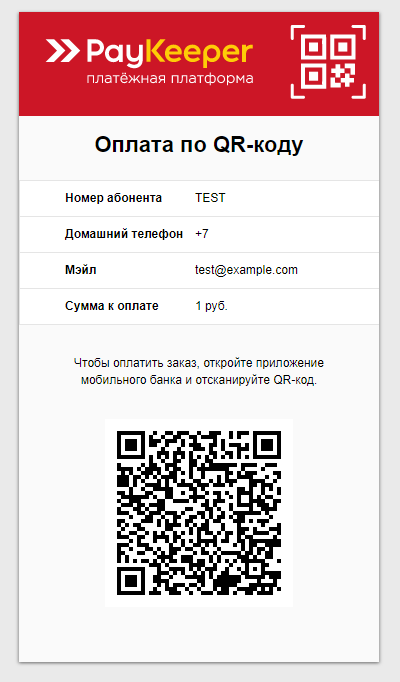 Оплата по QR коду с помощью СБП